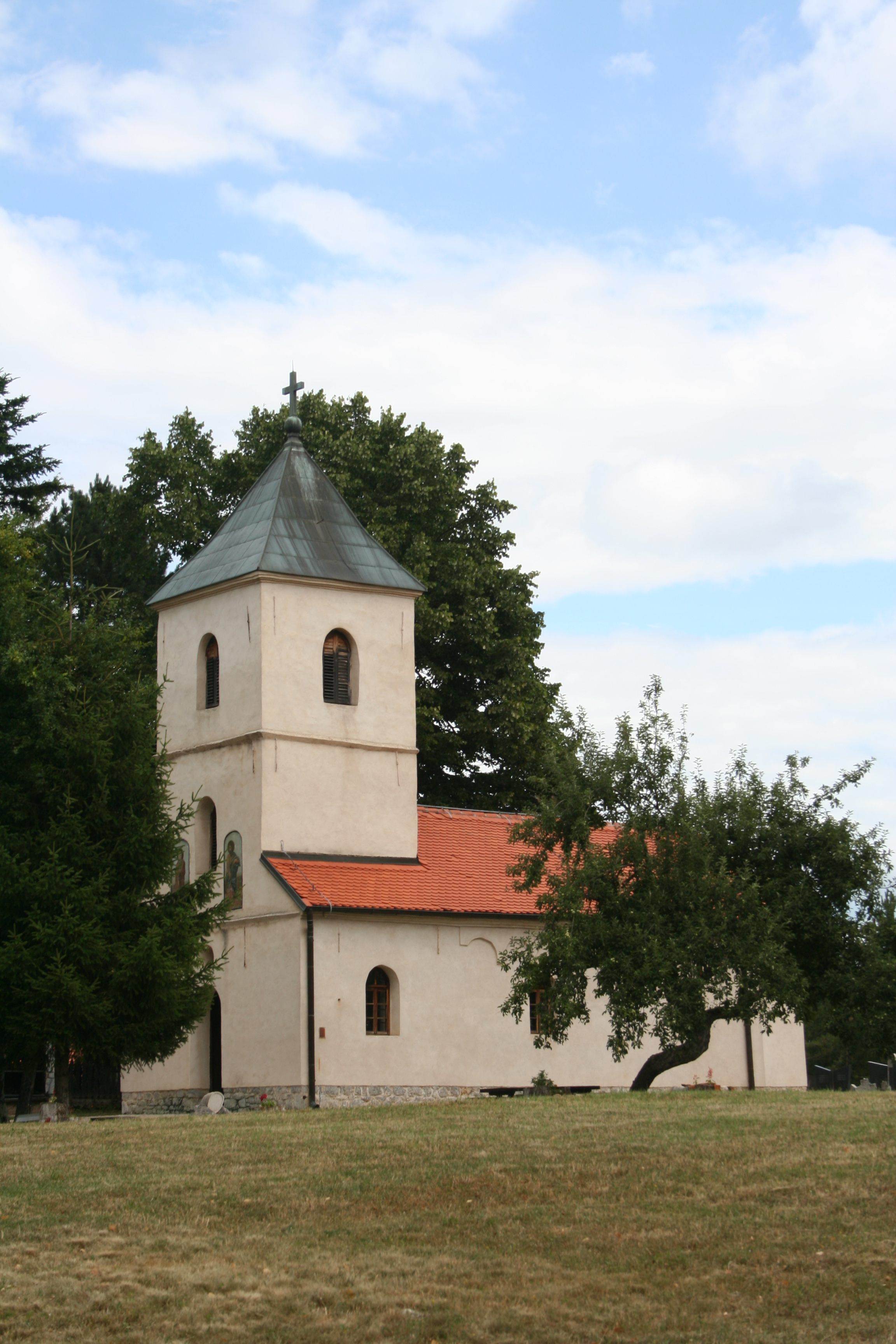 Crkva Svetih apostola Petra i Pavla u Sirogojnu